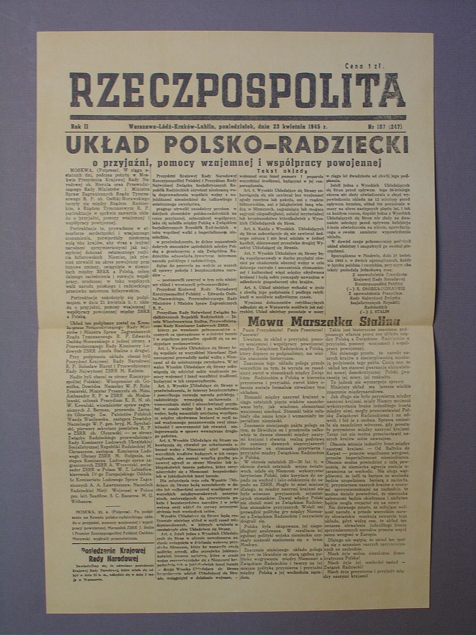 Rzeczpospolita nr 247 z 1945